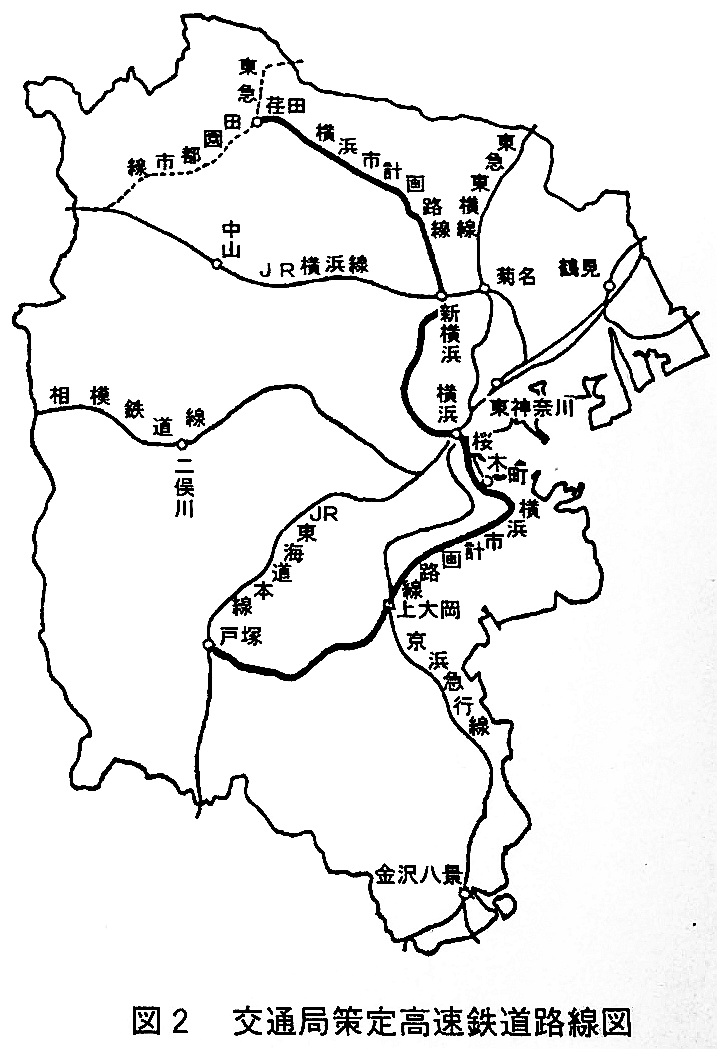 1963年3月に横浜市交通局運輸調査室が公表した、高速鉄道計画の路線図。